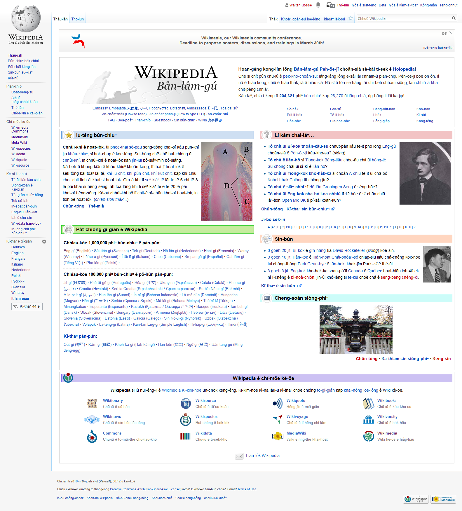 Screenshot hlavní strany min nan wikipedie